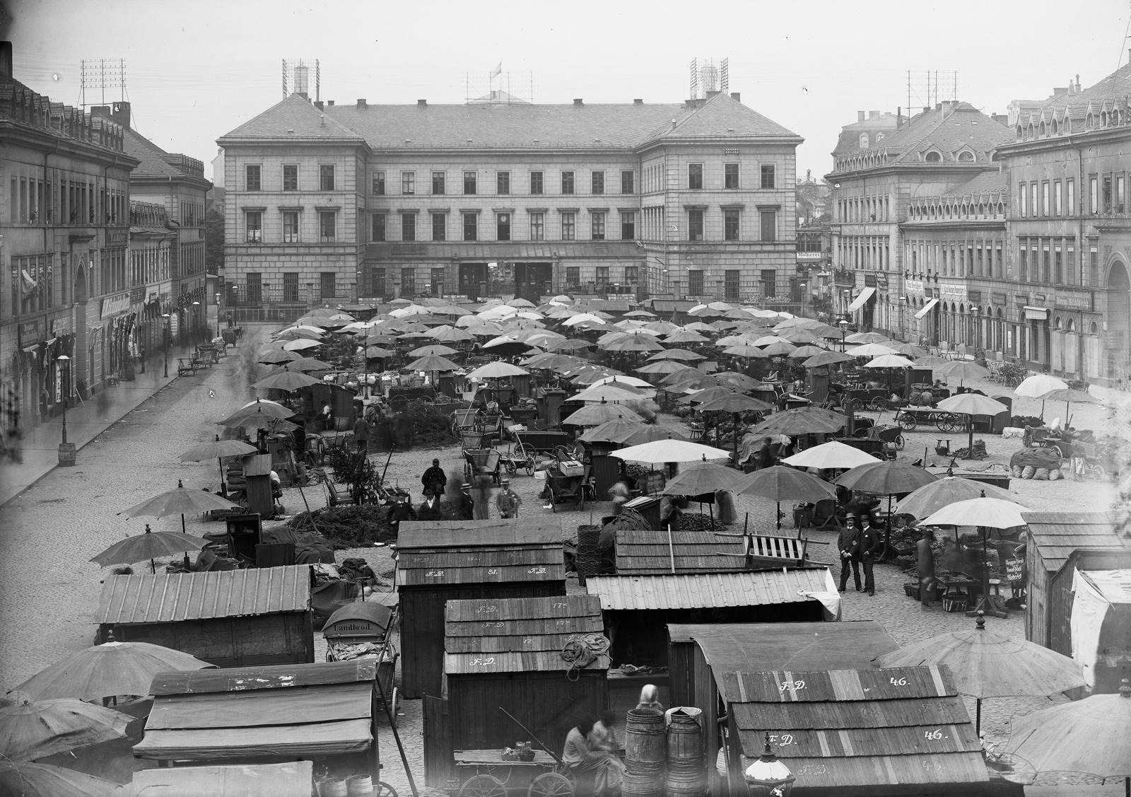 Dresden, Kaufhalle am Antonsplatz, Anlage des Antonplatzes durch Gottlob Friedrich Thormeyer 1826 und Bau der Kaufhallen durch Anton Ludwig Blaßmann 1826 bis 1828